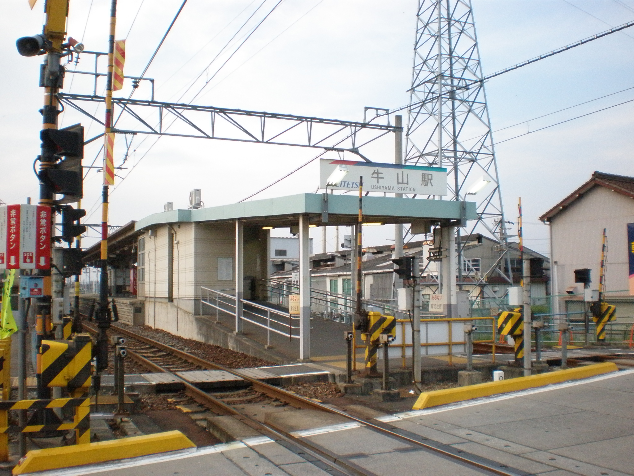 愛知県春日井市にある牛山駅